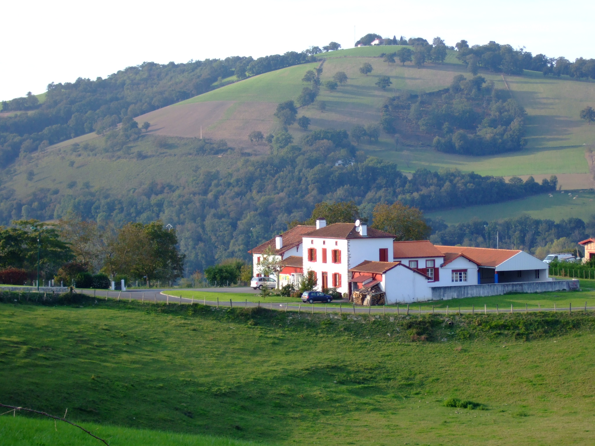 Larribar